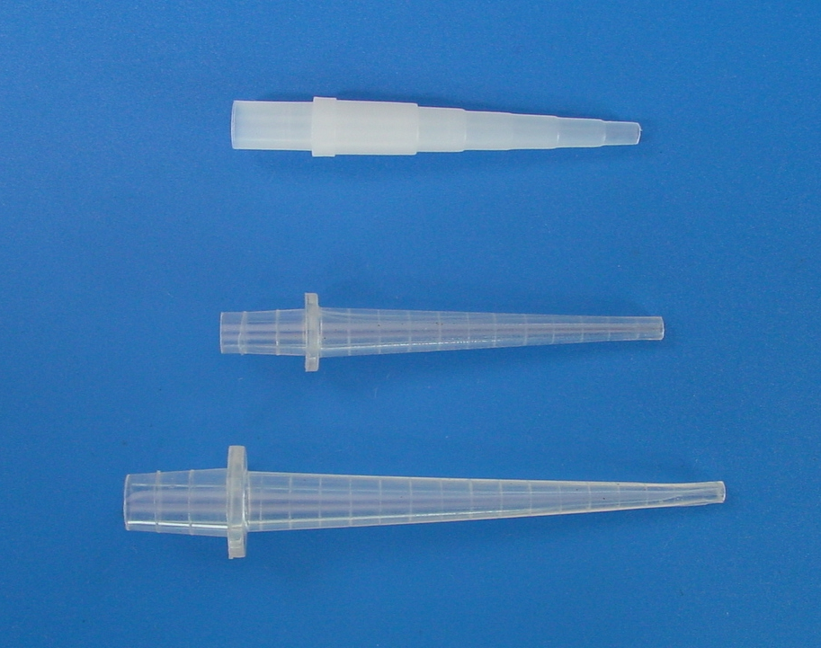 O conector tubular universal tem uma das extremidades em formato cônico de modo a permitir a conexão com tubos de diversos tamanhos.